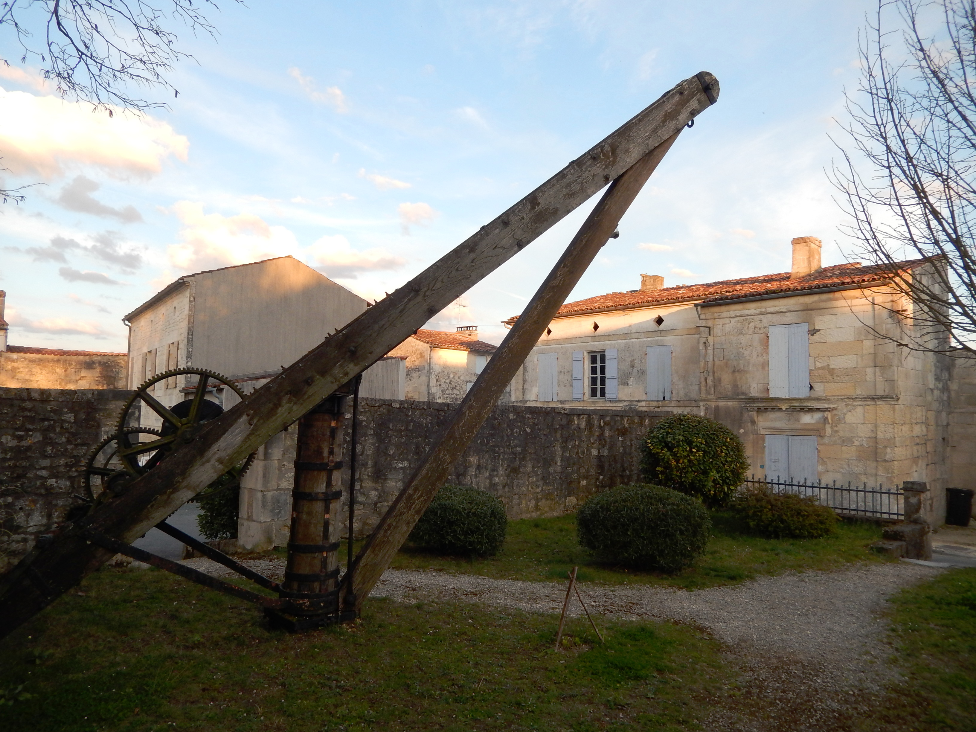 Crazannes (Charente-Maritime, France) : Dans ce village, marqué par l'extraction de pierres calcaires, le souvenir des carrières est bien présent. Par exemple, dans le petit parc dans lequel cette photo a été prise, une chèvre (une grue en bois servant à extraire les blocs de pierre) a été posée ; on peut voir des grues similaires dans les carrières elles-mêmes, ainsi qu'au milieu d'un carrefour giratoire situé entre Saint-Porchaire et Beurlay. À droite de l'image, après le parc, on voit une maison typique, construite en pierres calcaires ; elle abritait, jusqu'à sa fermeture, le musée des Pierreux, qui exposait la vie, les outils et les conditions de travail des carriers de Crazannes.